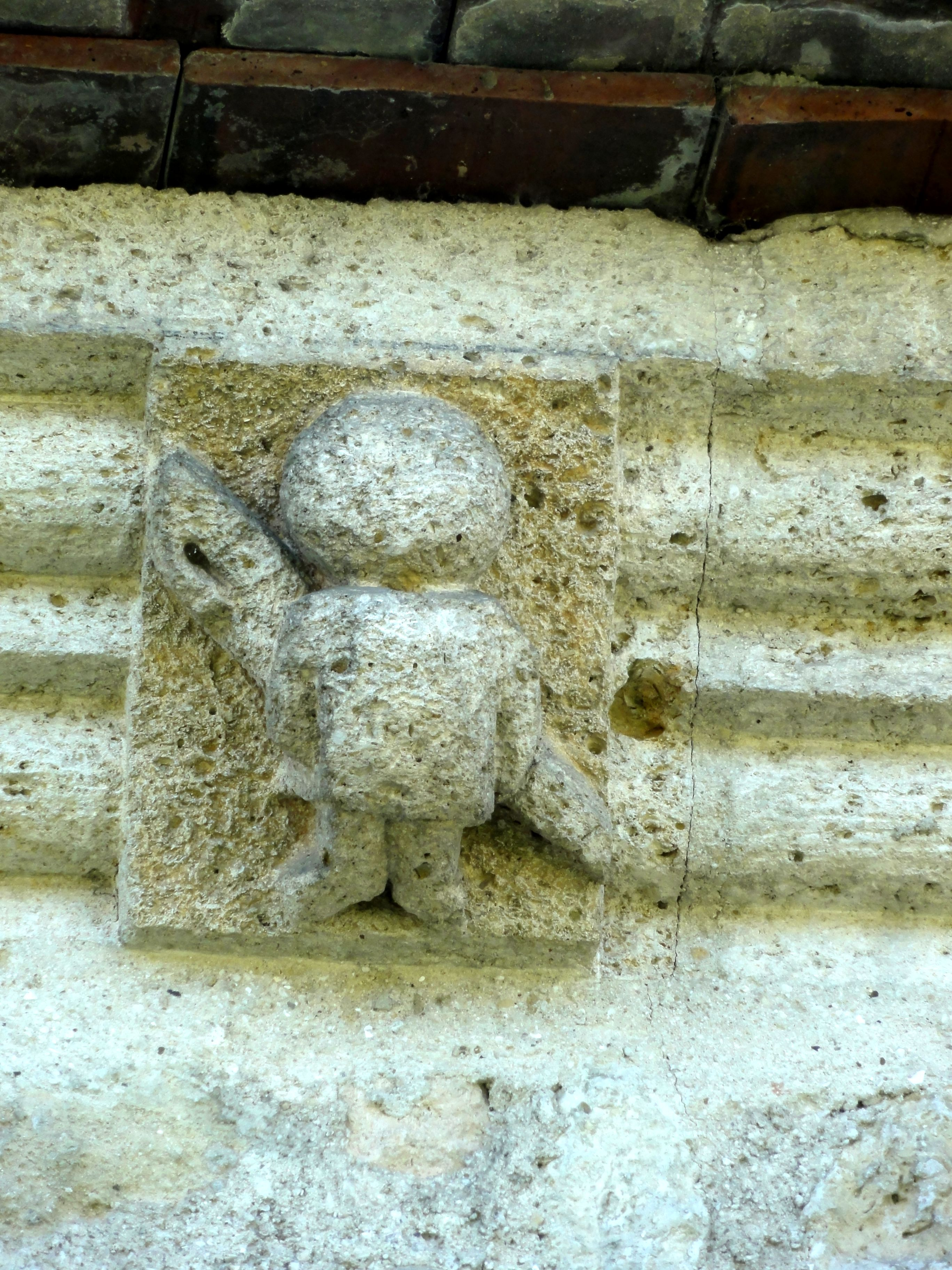 Bas-côté nord, modillon (refait).